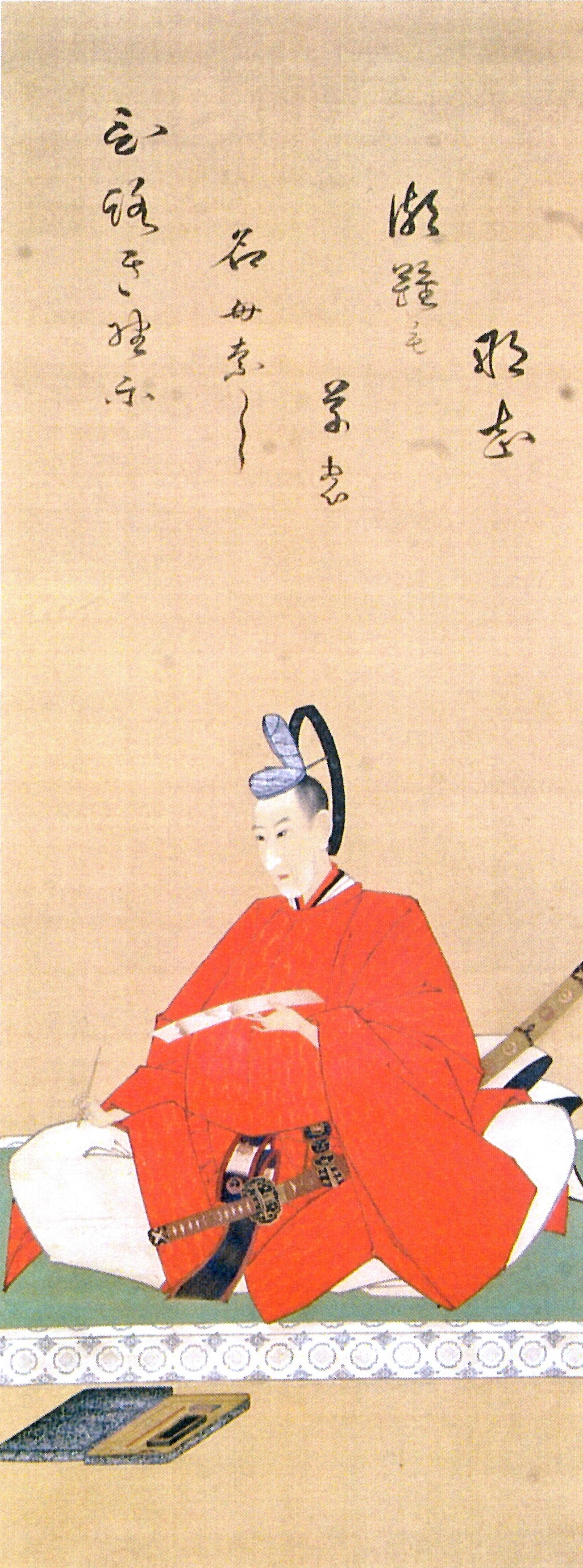 京極高聡(京極高備の次男)の肖像。